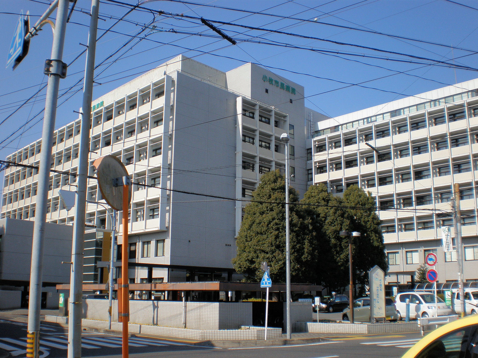 愛知県小牧市にある小牧市民病院